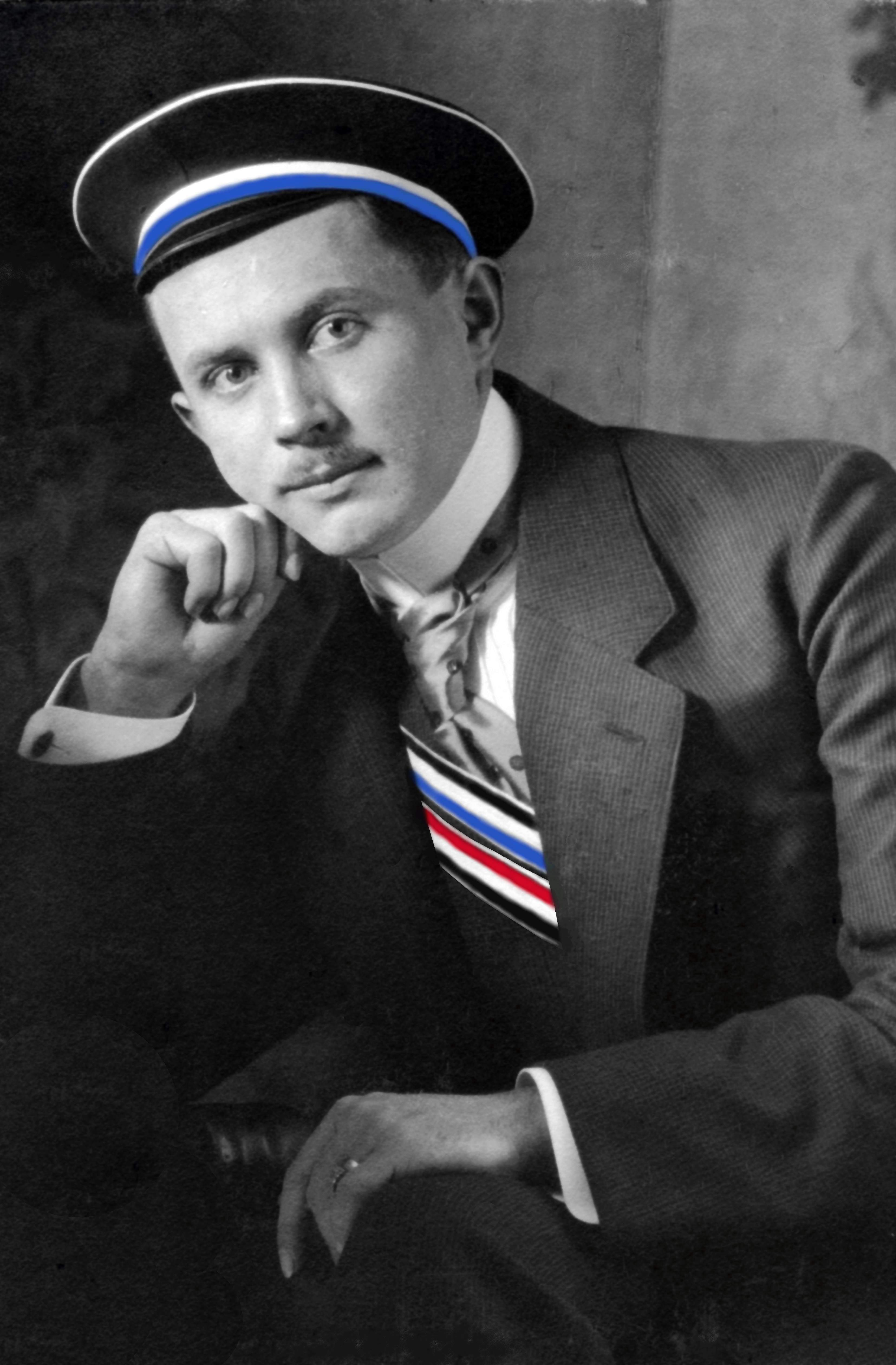 Porträtfotografie von Franz Albrecht Medicus.